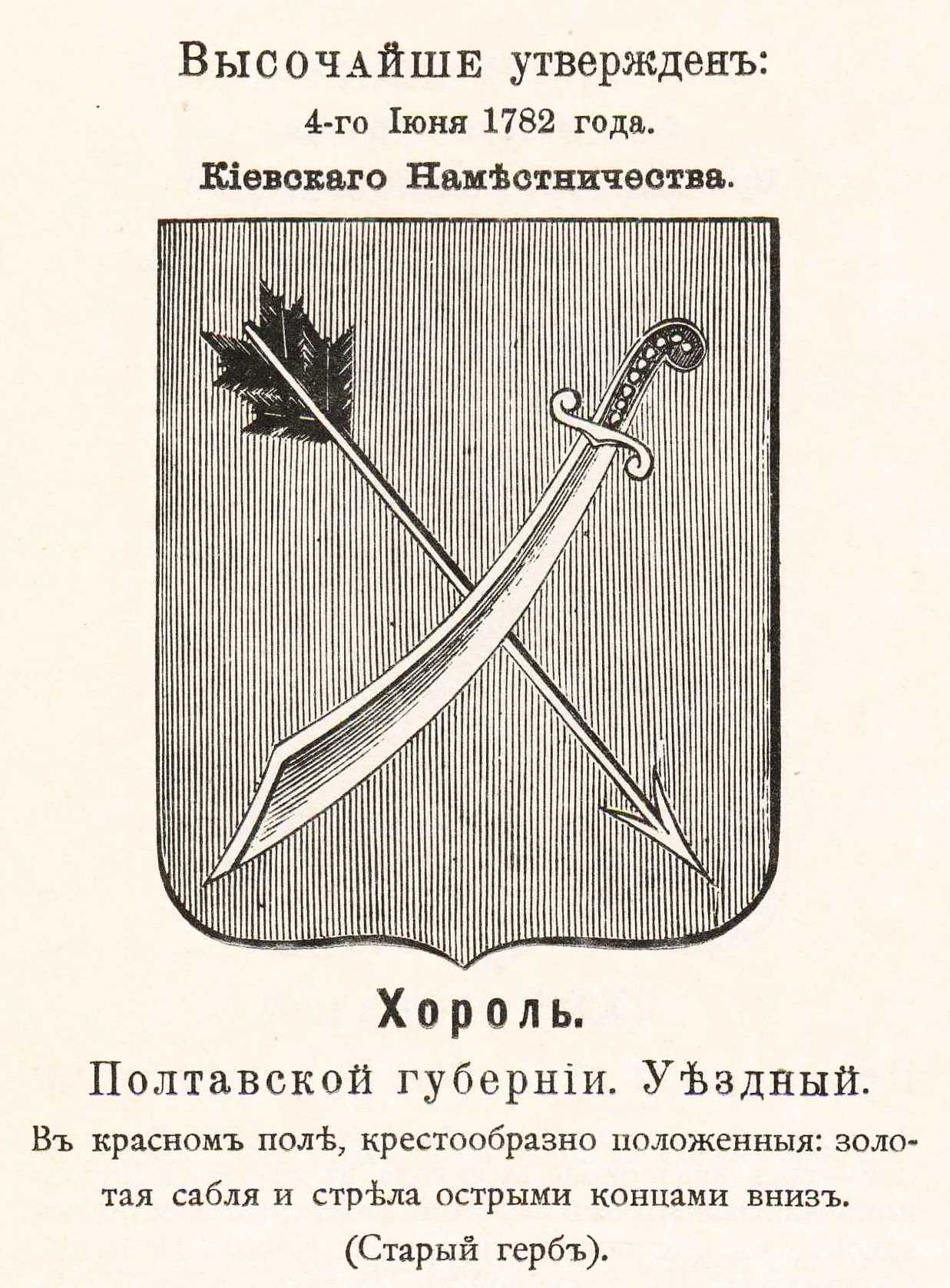 Official Russian Empire coat of arms Horol. Герб Российской Империи уездного города Хорол(ь) Киевского наместничества в 1782, Полтавской губернии в 1899 с официальным описанием в Гербовнике Винклера.